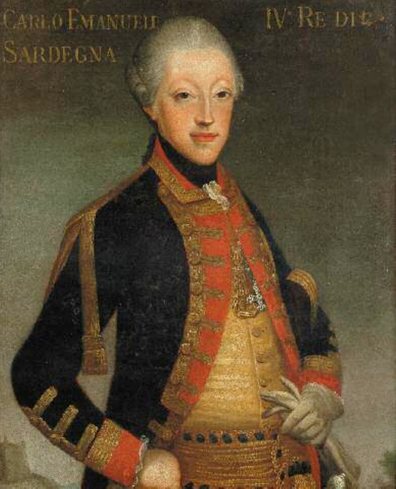 Carlo Emanuele IV di Savoia re di Sardegna (1751-1819)